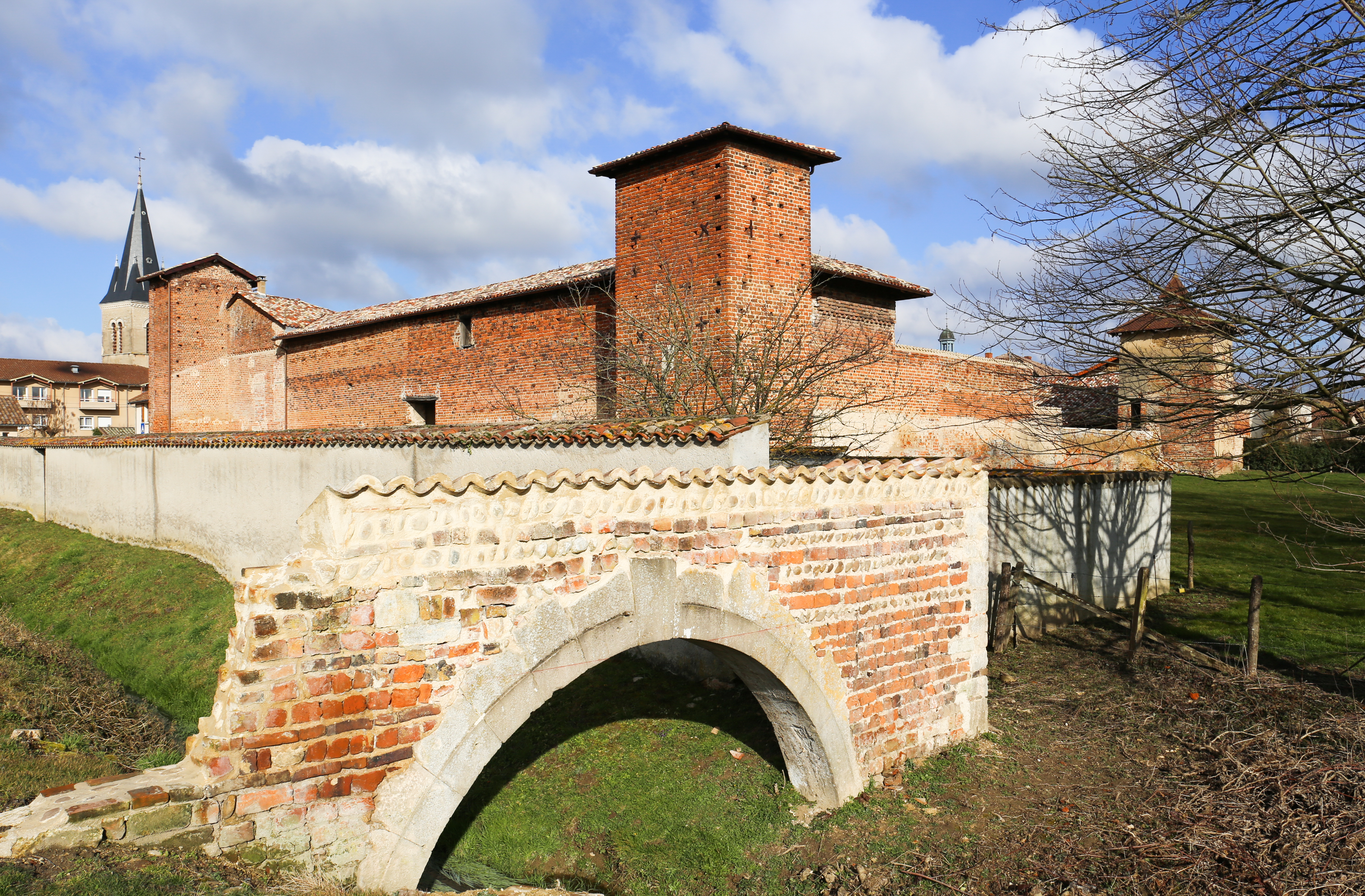 Vus d'ensemble des remparts avec pigeonnier .